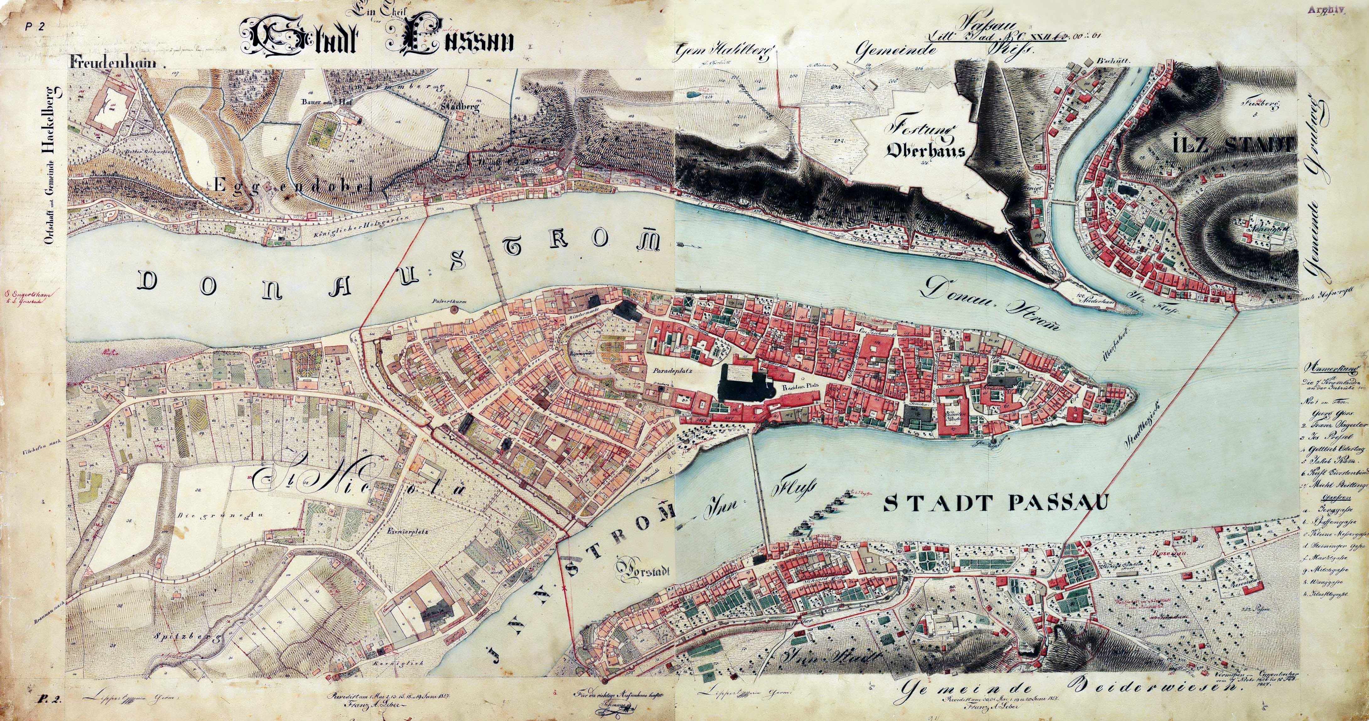 Altstadt von Passau